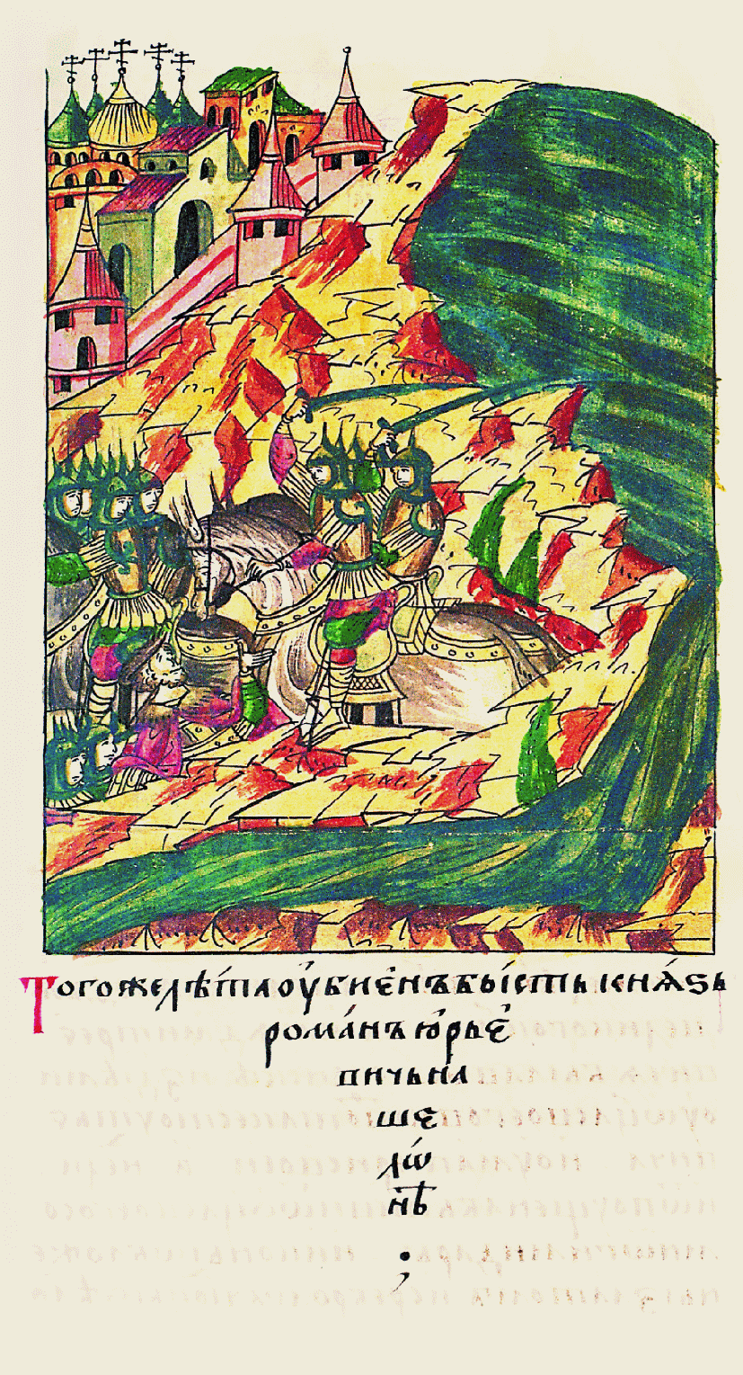 В том же году был убит князь Роман Юрьевич на Шелоне.